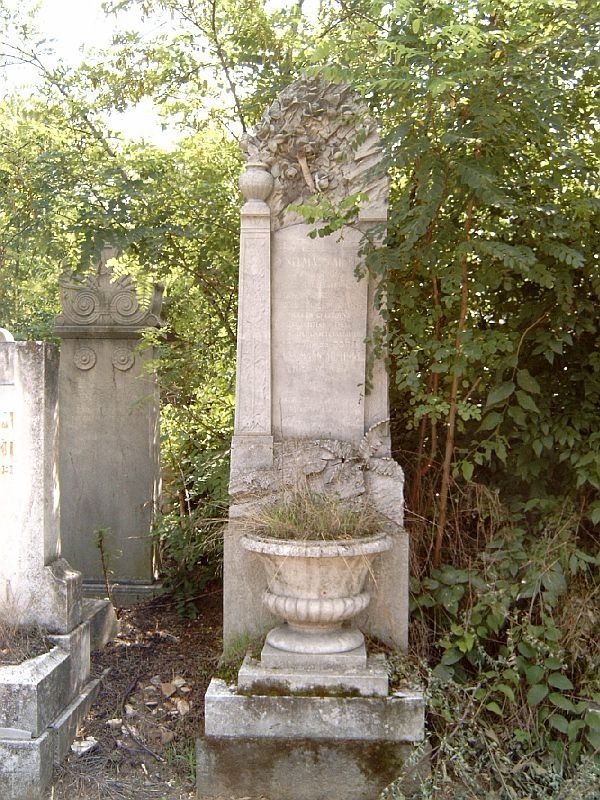 Neumann Ármin (Nagyvárad, 1845. február 14. – Budapest, 1909. január 31.) ügyvéd, jogi író sírja Budapesten. Kozma utcai izraelita temető: 5-1-14.